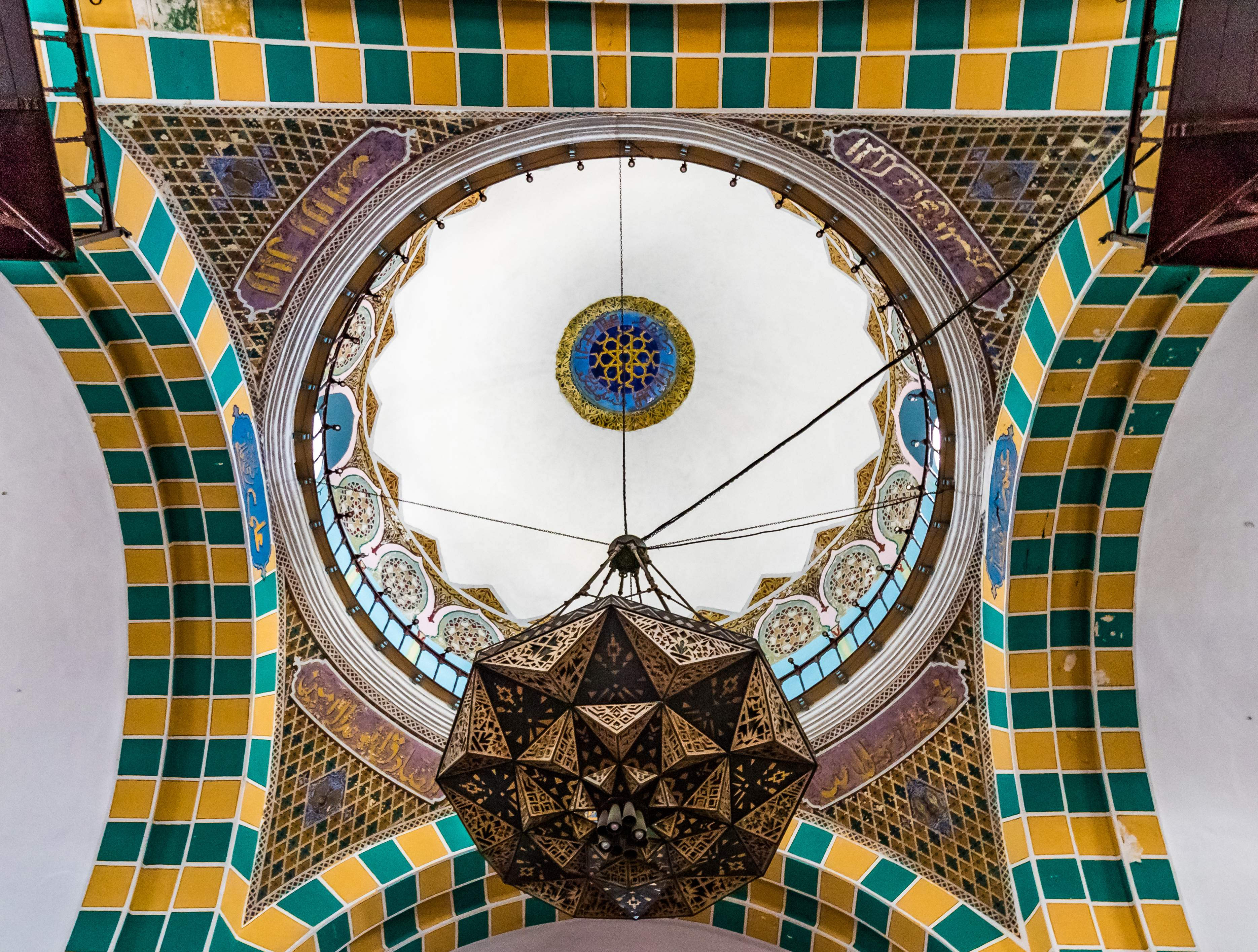 Jamaa al-Jdid ( الجامع الجديد, « nouvelle mosquée » en arabe) est une des mosquées historiques d'Alger. Elle est située dans le quartier de la basse Casbah. Elle a été construite en 1660 dans le style mauresque. Sa proximité avec la mer lui valut aussi son surnom de Mosquée de la Pêcherie. Elle est construite en pierre, marbre, brique et plâtre. Le décor intérieur est fait de céramique et de bois. Source wikipédia